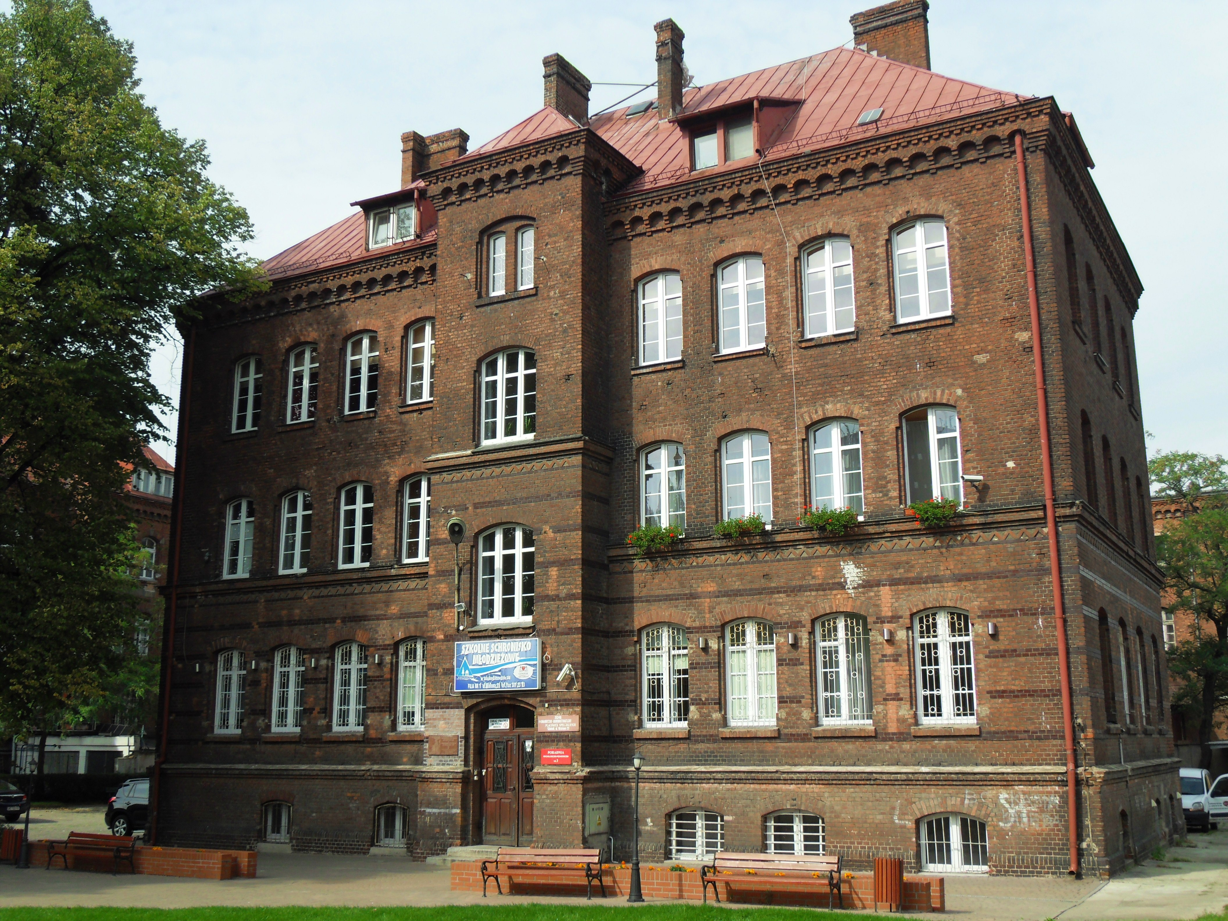 Gdańsk, ul. Wałowa 21. W budynku tym mieściła się w latach 1928-1939 polska szkoła podstawowa Macierzy Szkolnej w Gdańsku.